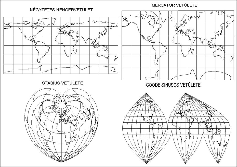 Térképvetületek, nemlineáris transzformáció (2D-ben)